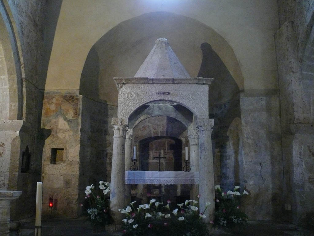 Chiesa di Santa Maria Maggiore, il Ciborio